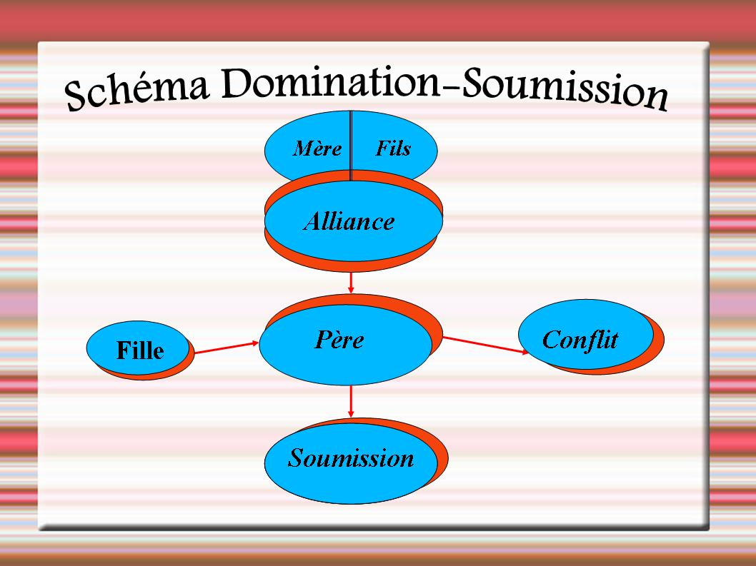 Schéma relationnel général dans la famille